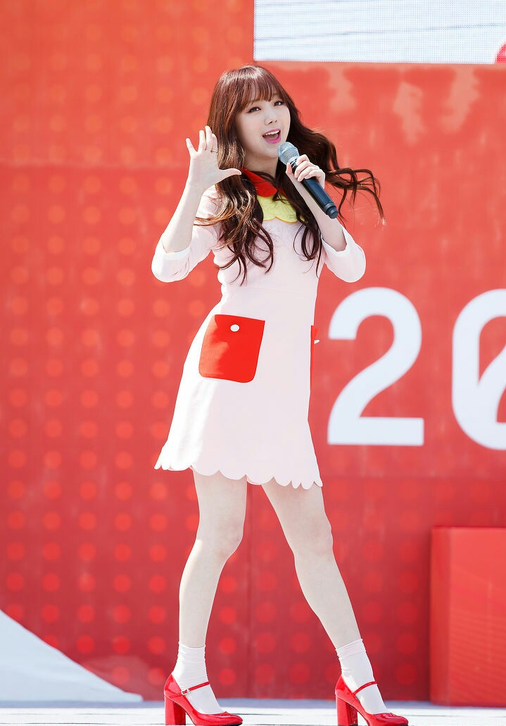 170401 러블리즈 불스레이스